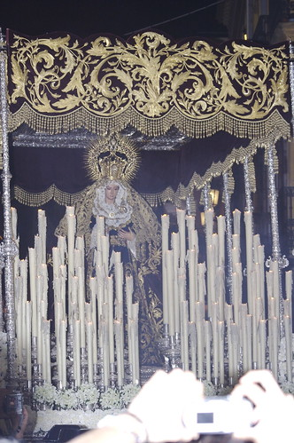 Virgen de la Cabeza de las Siete Palabras. Semana Santa en Sevilla. Año 2007 Foto realizada y propiedad de Ángel Chacón